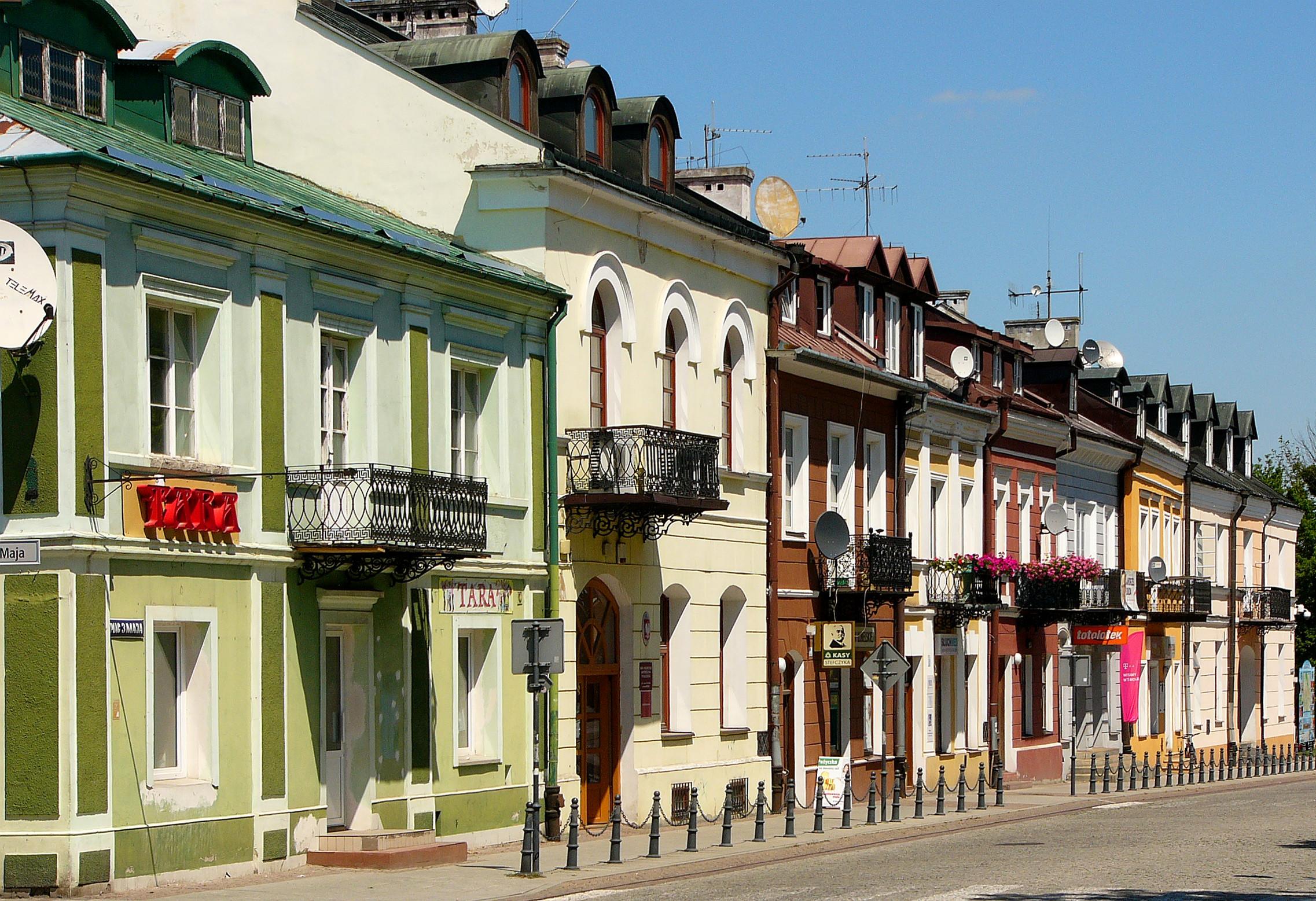 Häuser am Ring in Krasnystaw